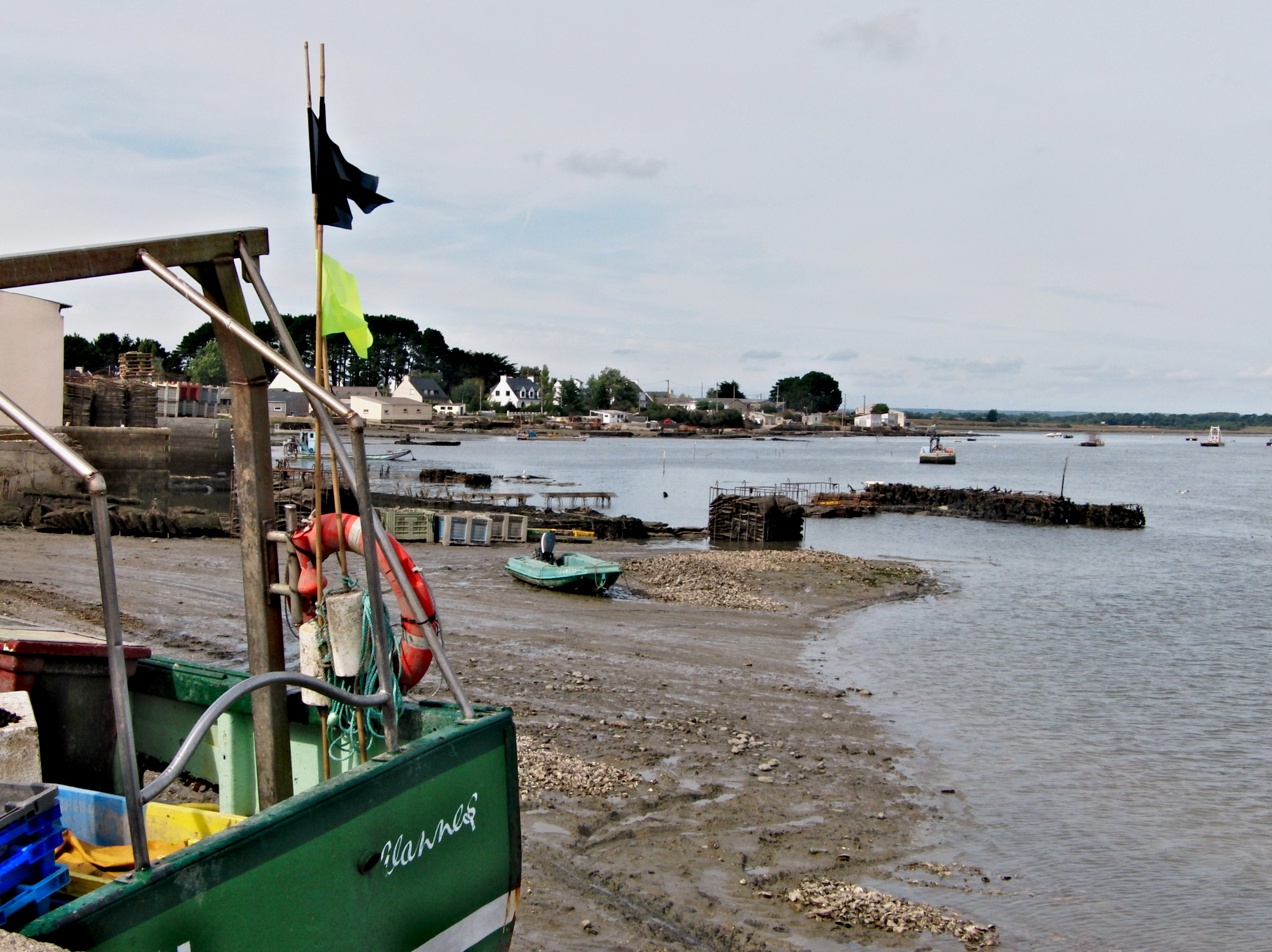 Sarzeau, Port du Logéo, Parc naturel régional du Golfe du Morbihan.- Golfe du Morbihan